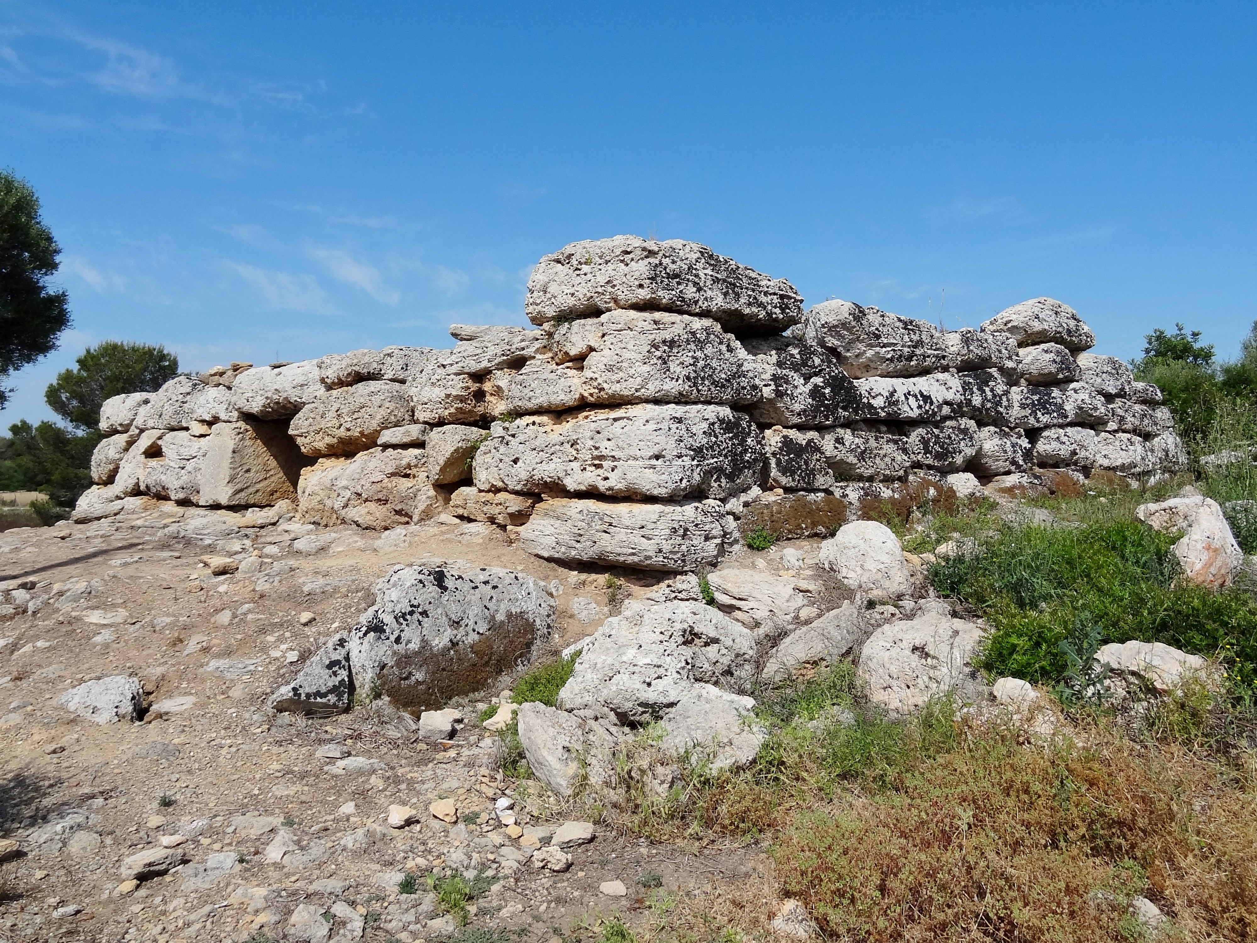 Talaiot de sa Cova de sa Nineta am Abzweig der Straße Richtung Son Serra de Marina, Mallorca, Spanien